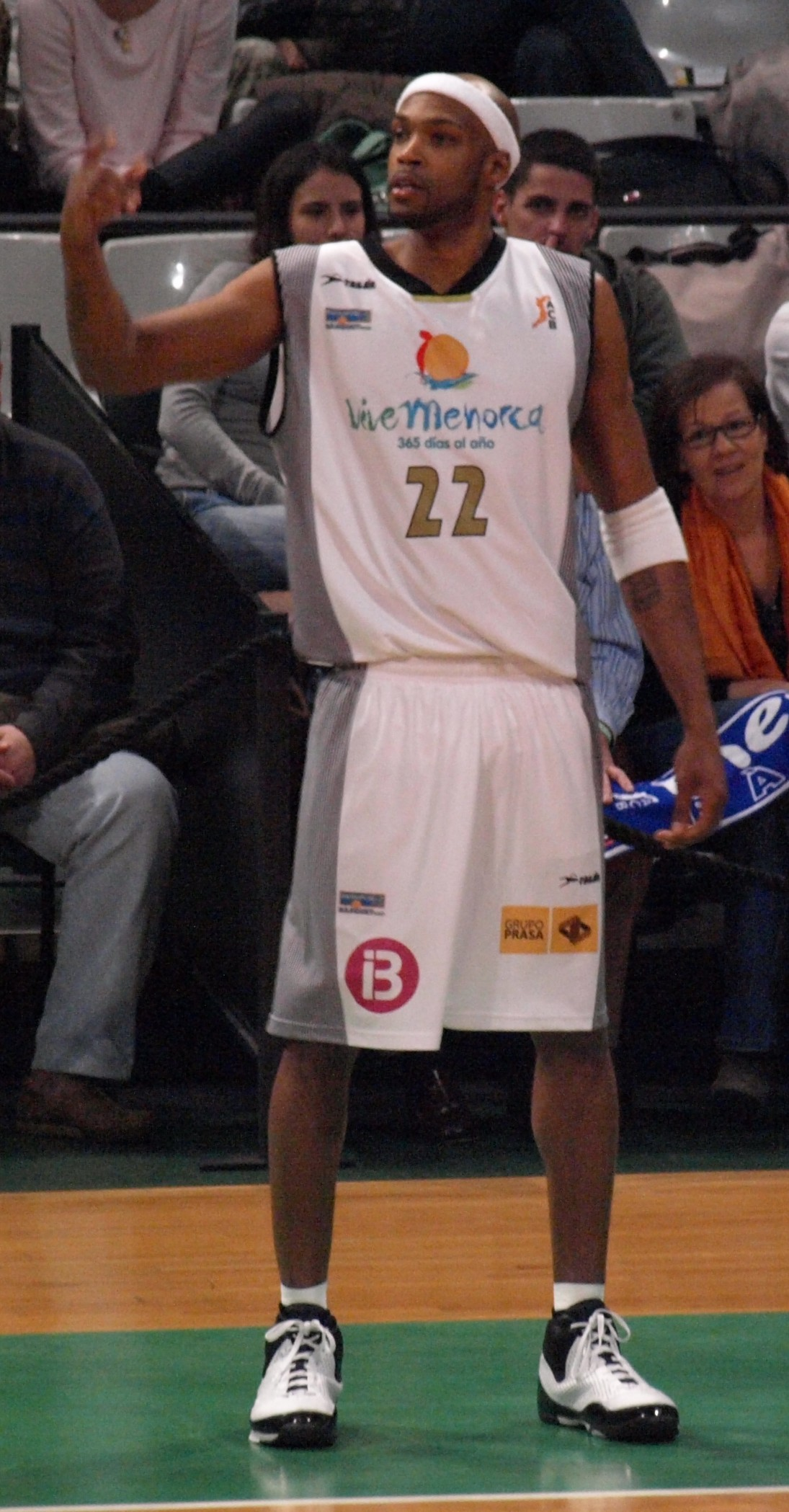 Marcus Faison, en el partido que enfrentó al Vive Menorca y al DKV Joventut de liga ACB en el Olímpico de Badalona en enero de 2009